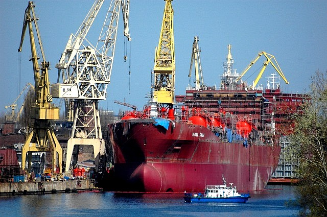 Stocznia Szczecińska Nowa Ship name: BOW SAGA IMO Number: 9215309 MMSI Number: 258960000 Callsign: LADM7 Length: 283 m Beam: 32 m